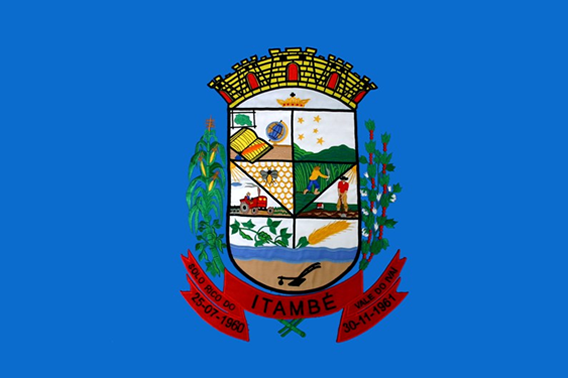 Bandeira de Itambé-PR